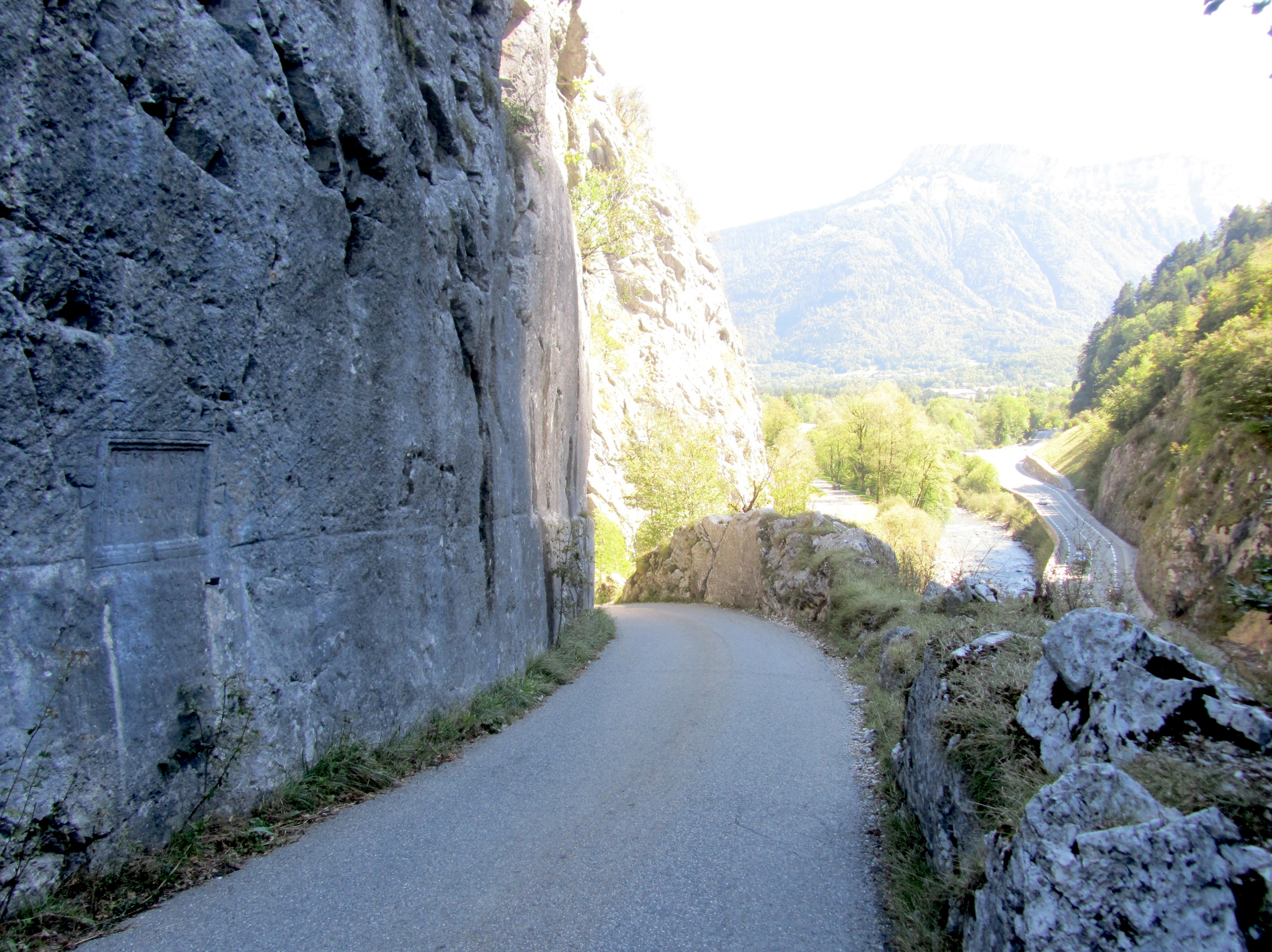 Portion de voie romaine et inscription commémorative encastrée dans le roc près du pont de Saint-Clair, près de la village de Dingy-Saint-Clair